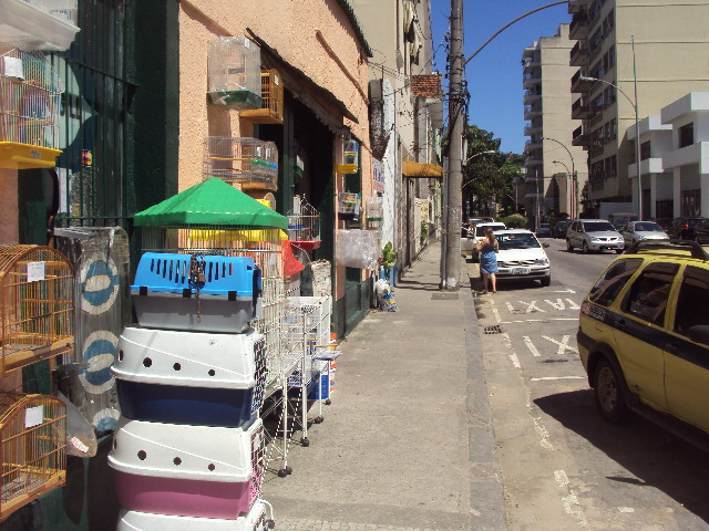 Vista da Rua Ipiranga, esquina com a Rua das Laranjeiras, Rio de Janeiro-RJ, Brasil.